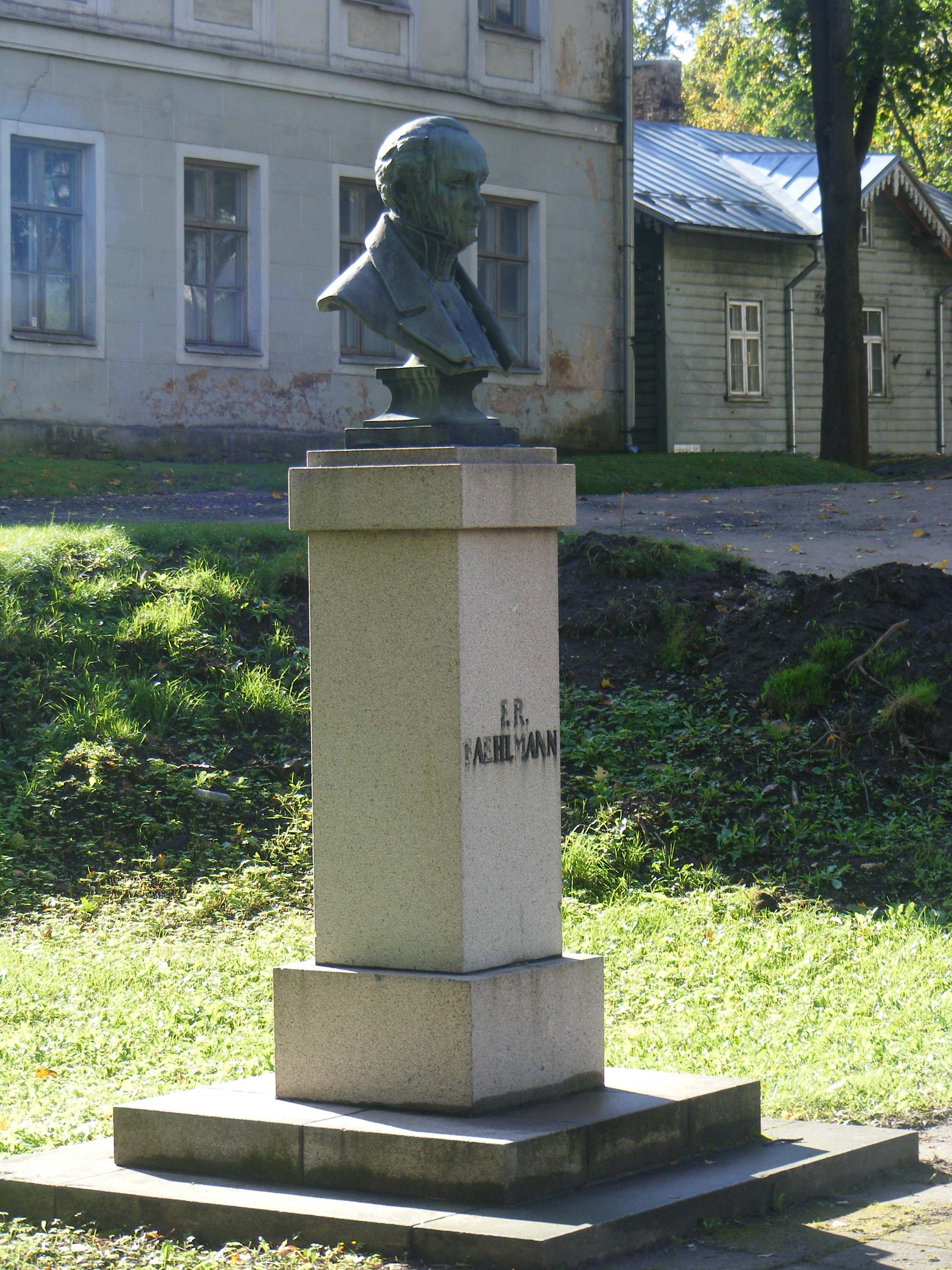 Monument Tartus Vana Anatoomikumi ees, skulptor Voldemar Mellik (1887–1949)